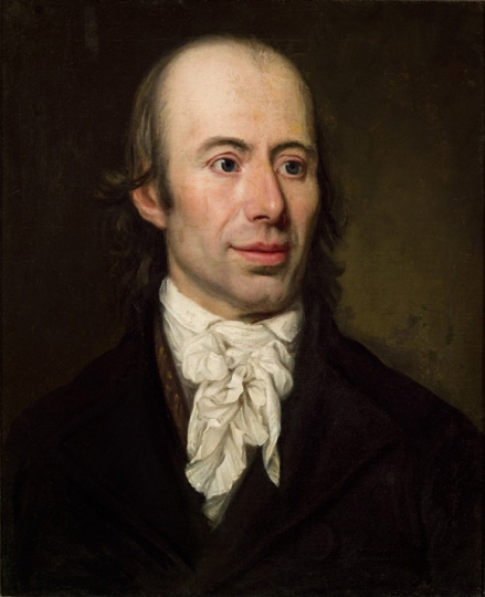 Johann Heinrich Voss (1751-1826)